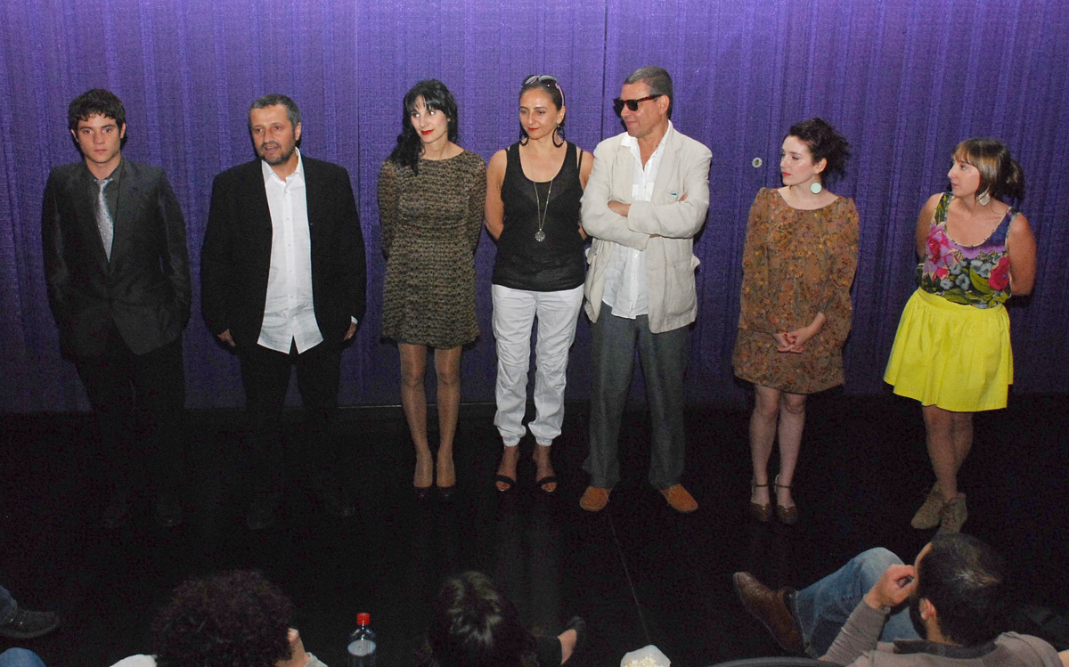 Cinemark, Pre-estreno película Bombal